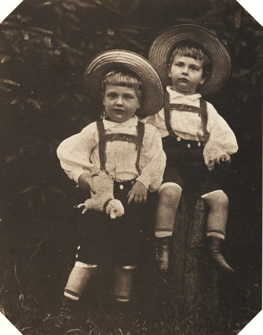 Darstellung der Söhne des letzten sächsischen Königs: Links Kronprinz Georg, rechts Prinz Christian. Auf den Hosenträgern sind ihre Spitznamen „Putzi“ und „Tia“ eingestickt.